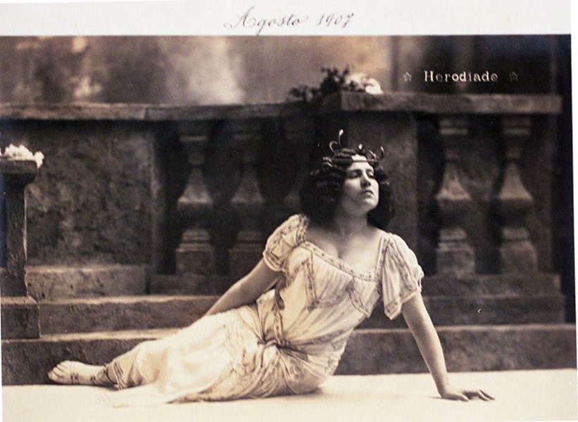 Foto del Soprano Maria Farneti nell'Opera Herodiade